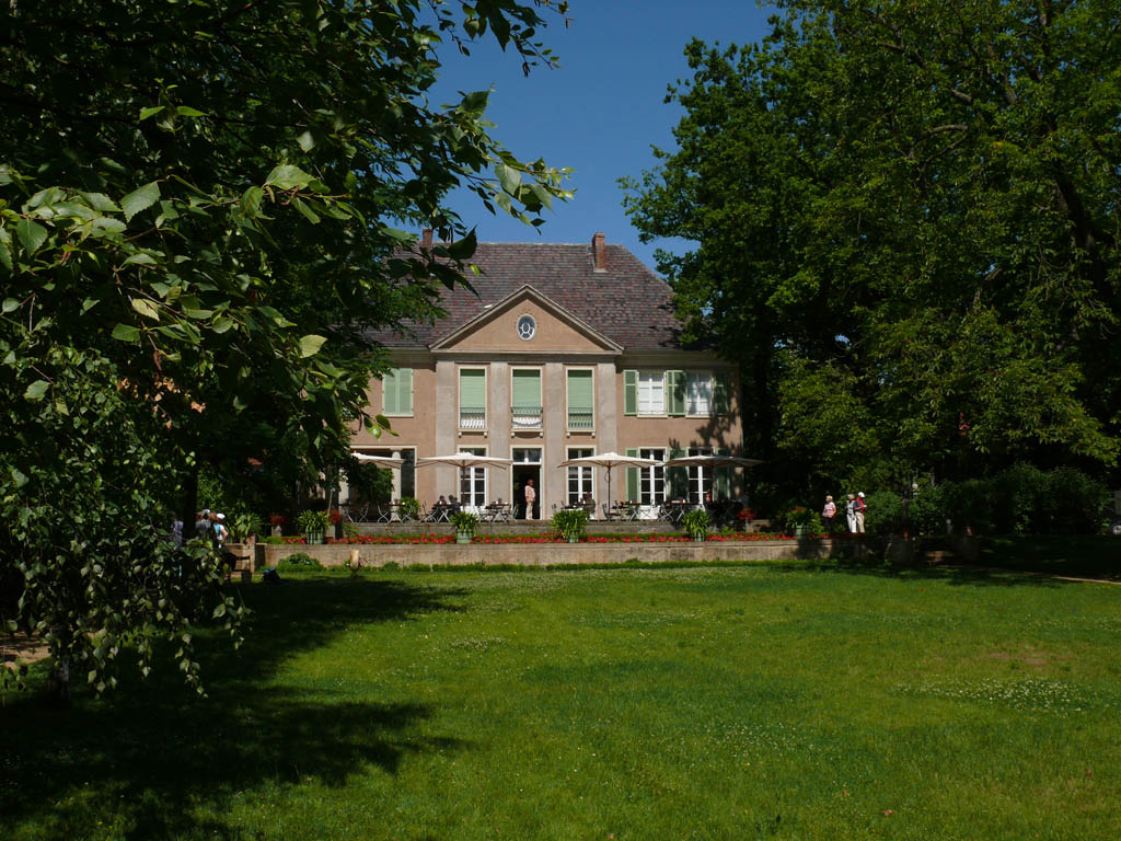 Blick auf die Liebermann Villa vom Wannseeufer